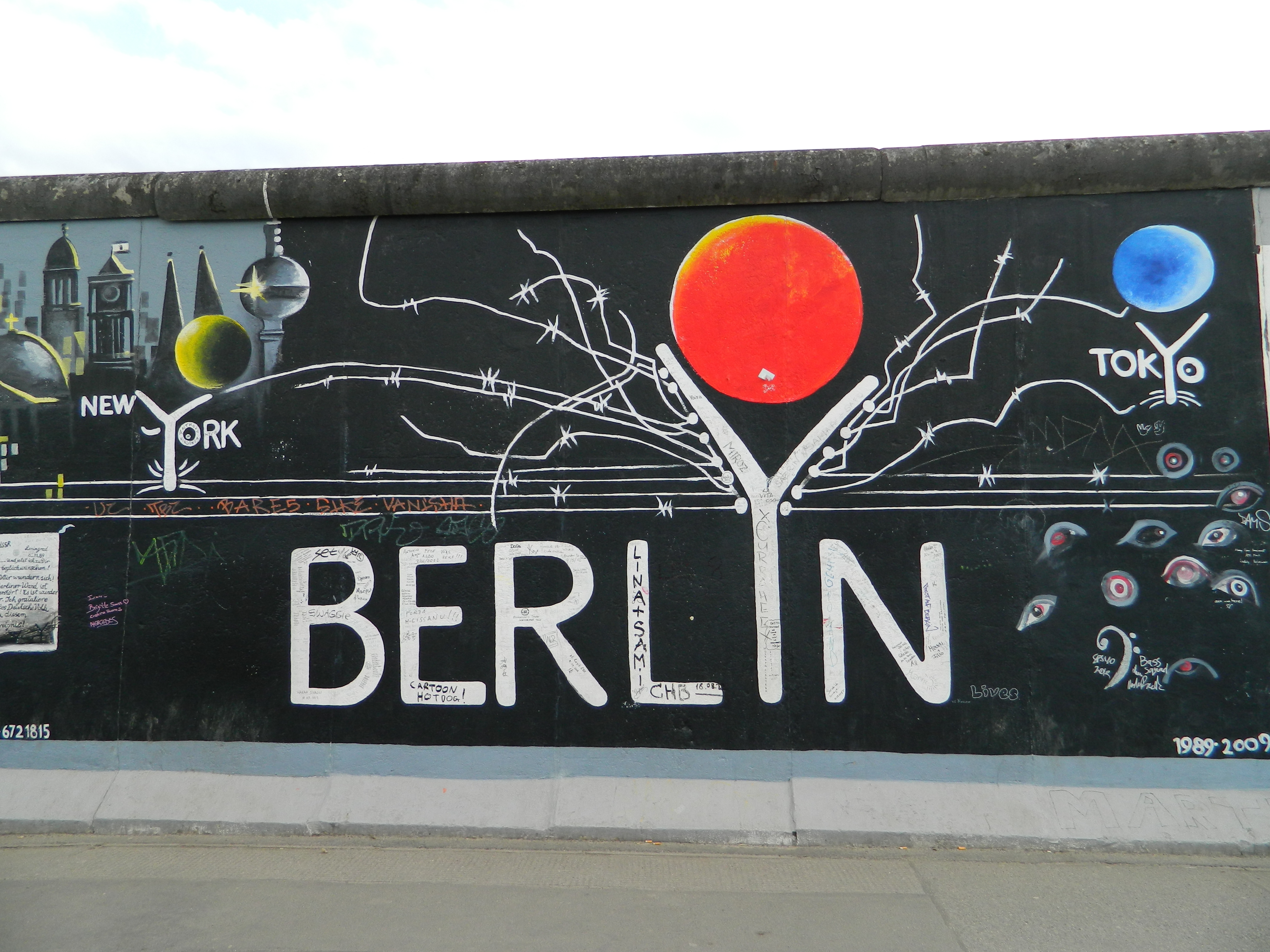 Berlin Wall - East Side Gallery